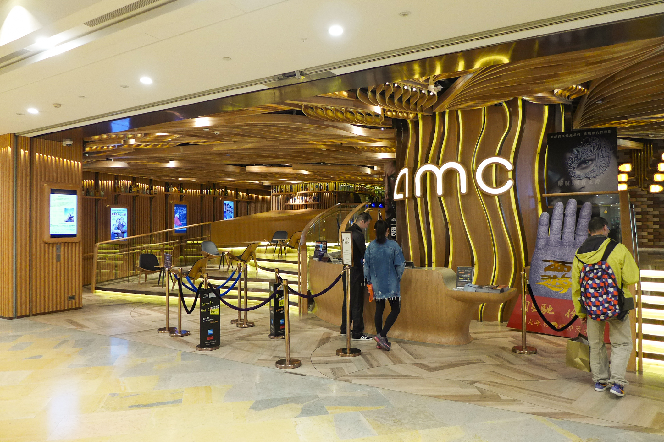 AMC Pacific Place